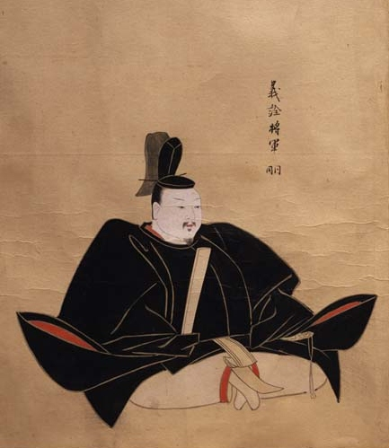 足利義詮（古画類聚）